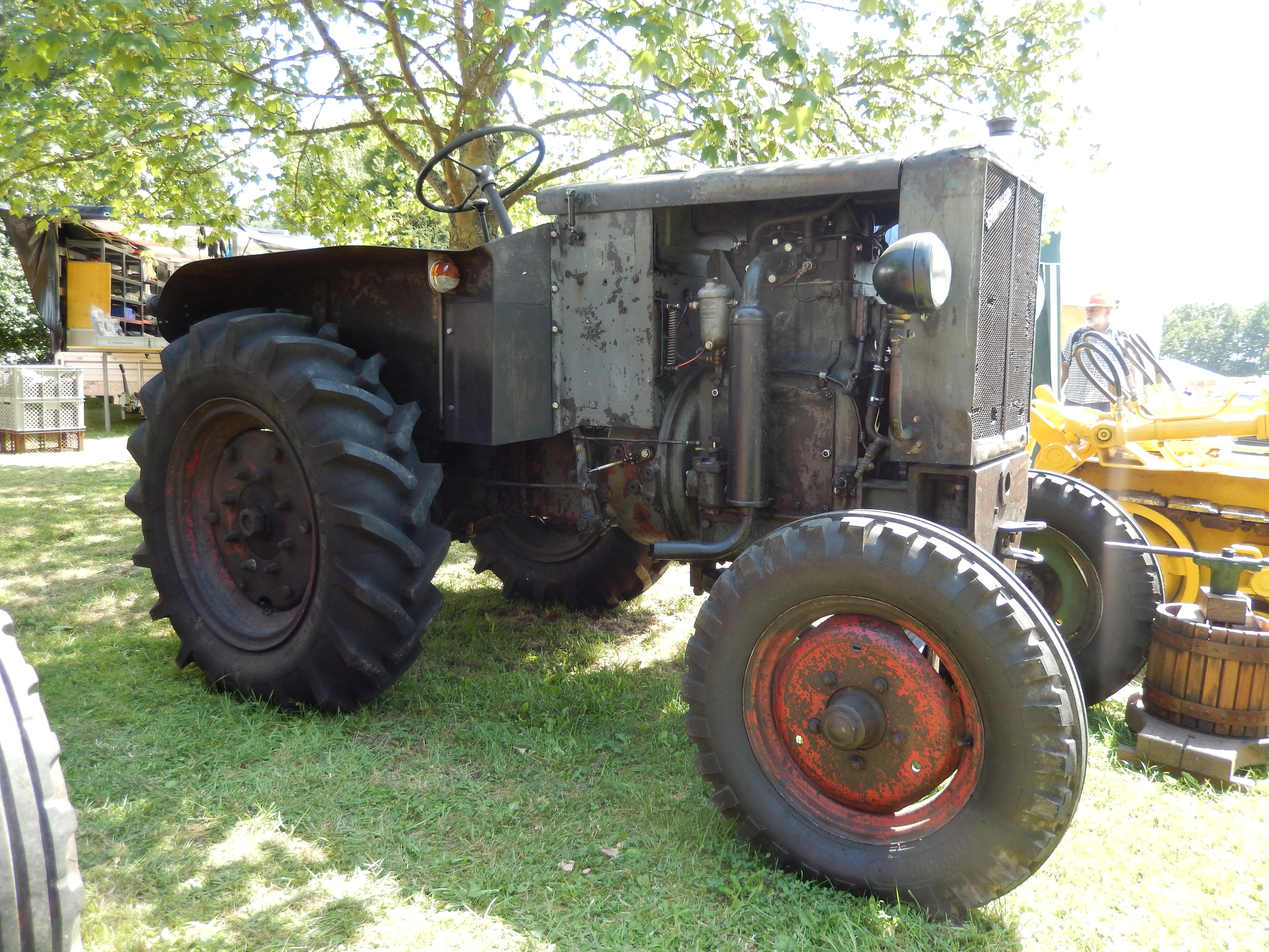 Ensinger AS25 Baujahr 1950 mit MWM 2 Zyl.Motor